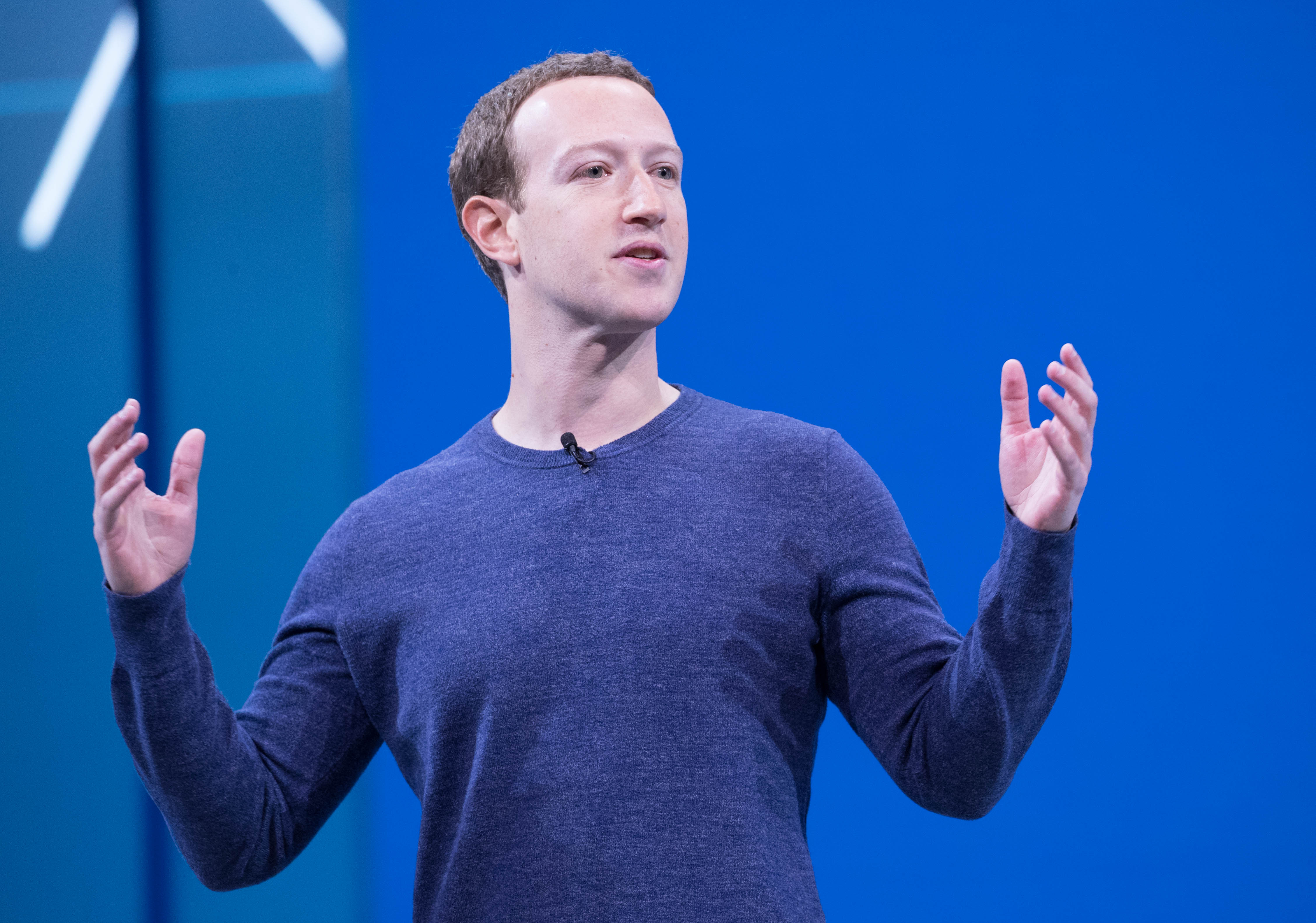 Mark Zuckerberg F8 2018 Keynote